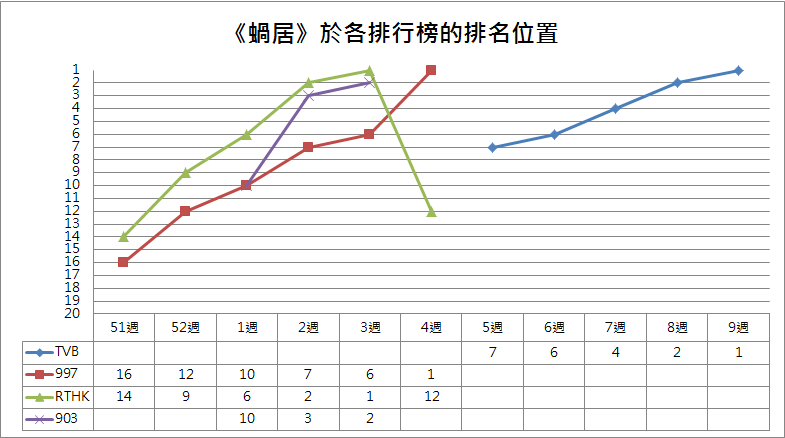 中文（香港）: 歌曲《蝸居》於各流行榜的排名位置